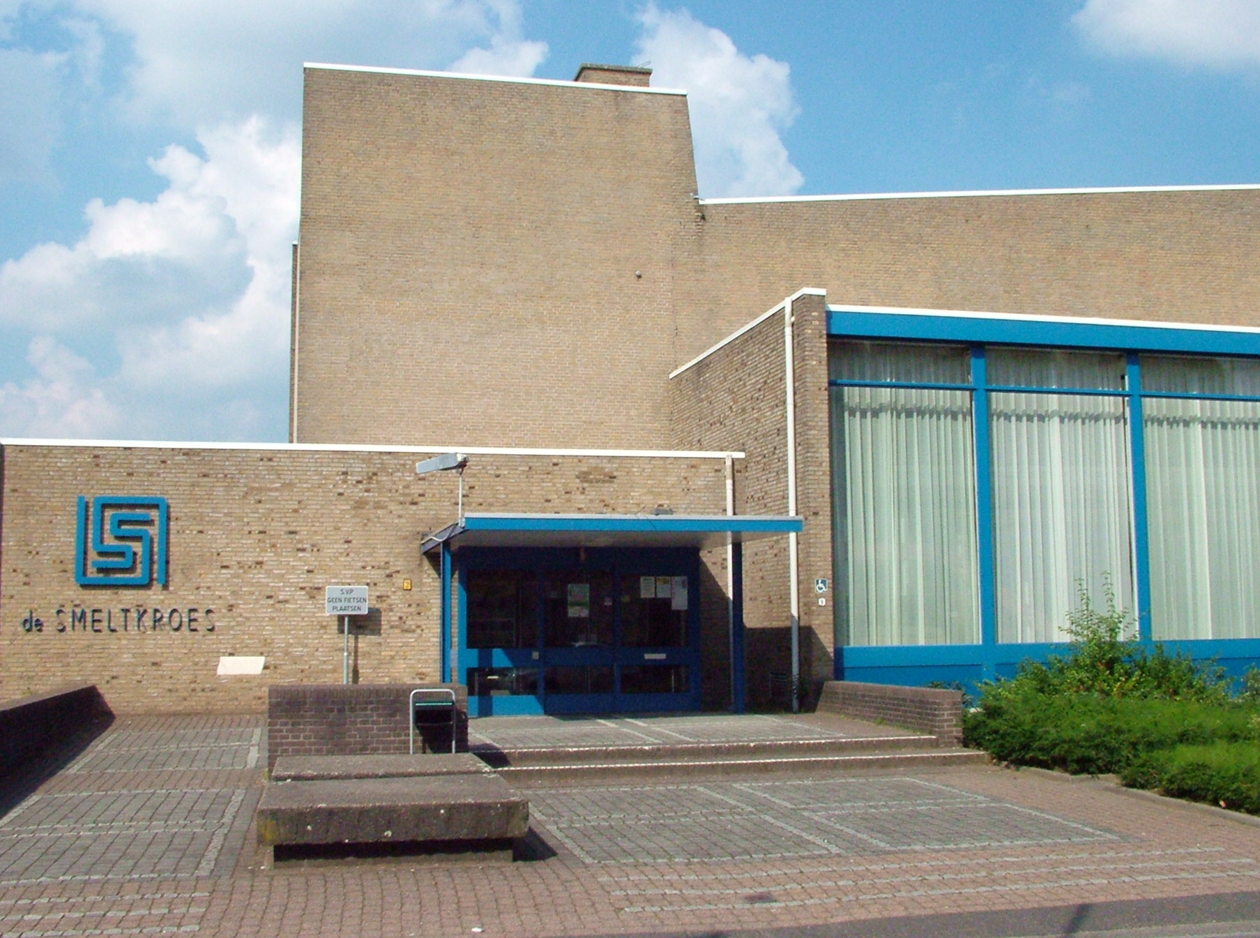 De Smeltkroes, cultureel centrum in Ulft. Gesloopt in 2009.